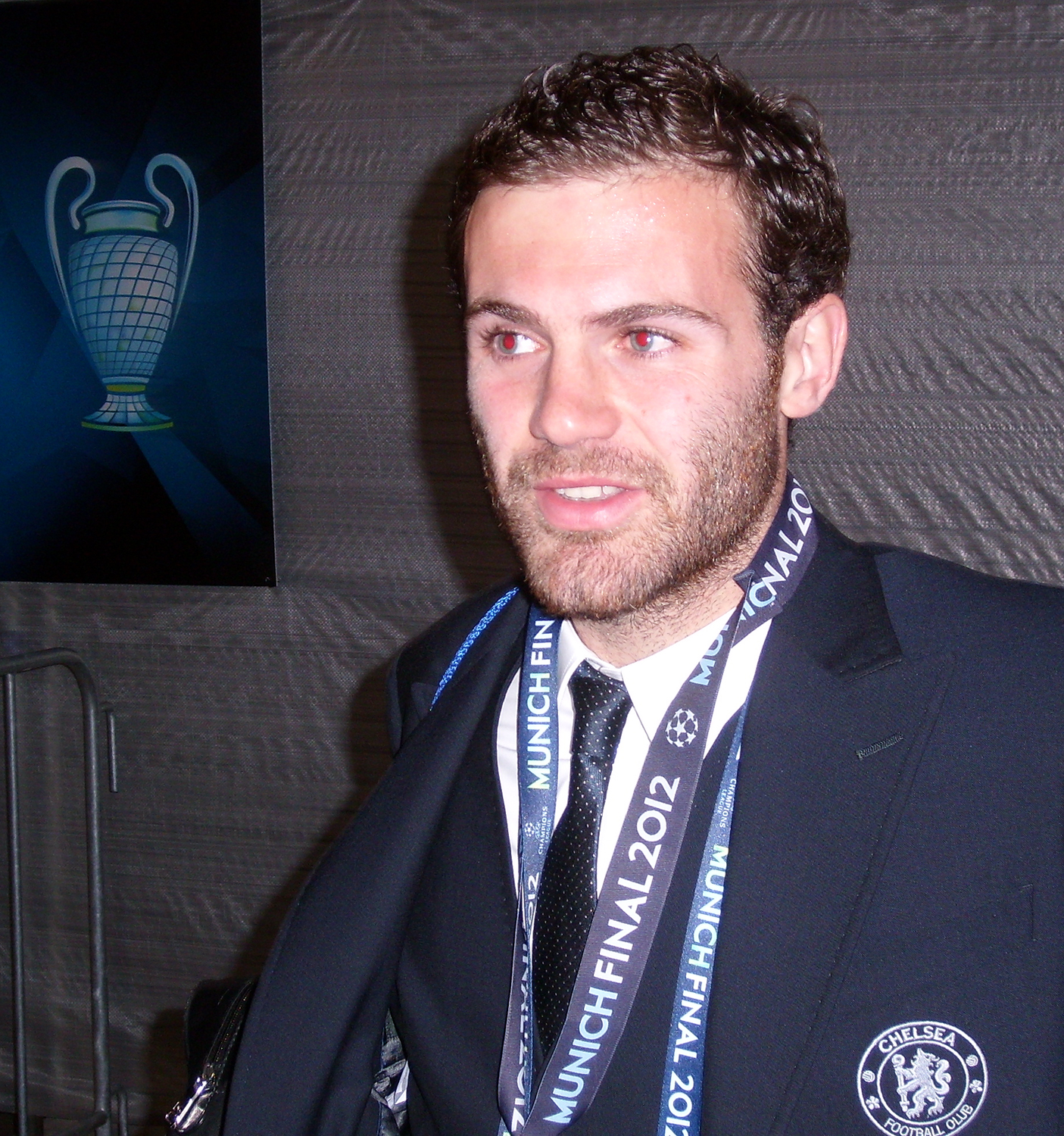 Juan Mata, 2012